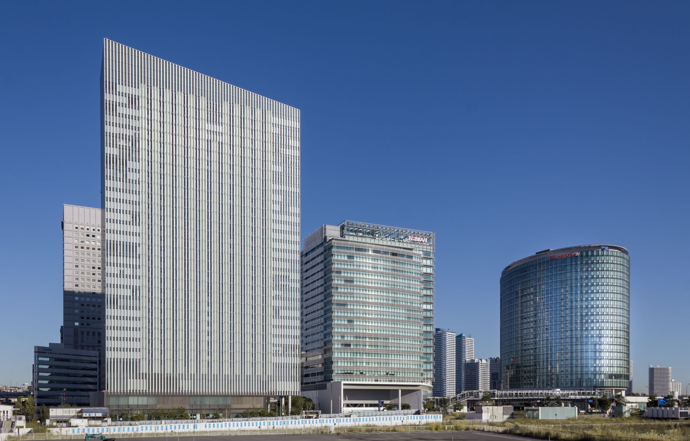 新高島地域のビル群